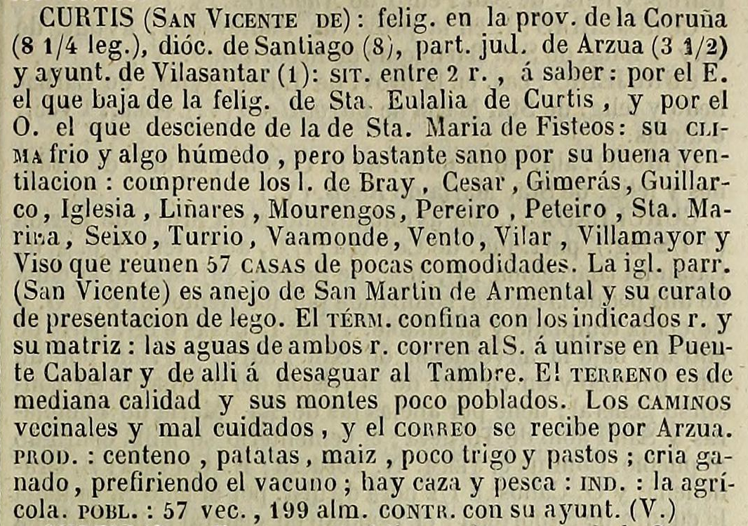 San Vicenzo de Curtis no Diccionario geográfico-estadístico-histórico de España y sus posesiones de Ultramar.